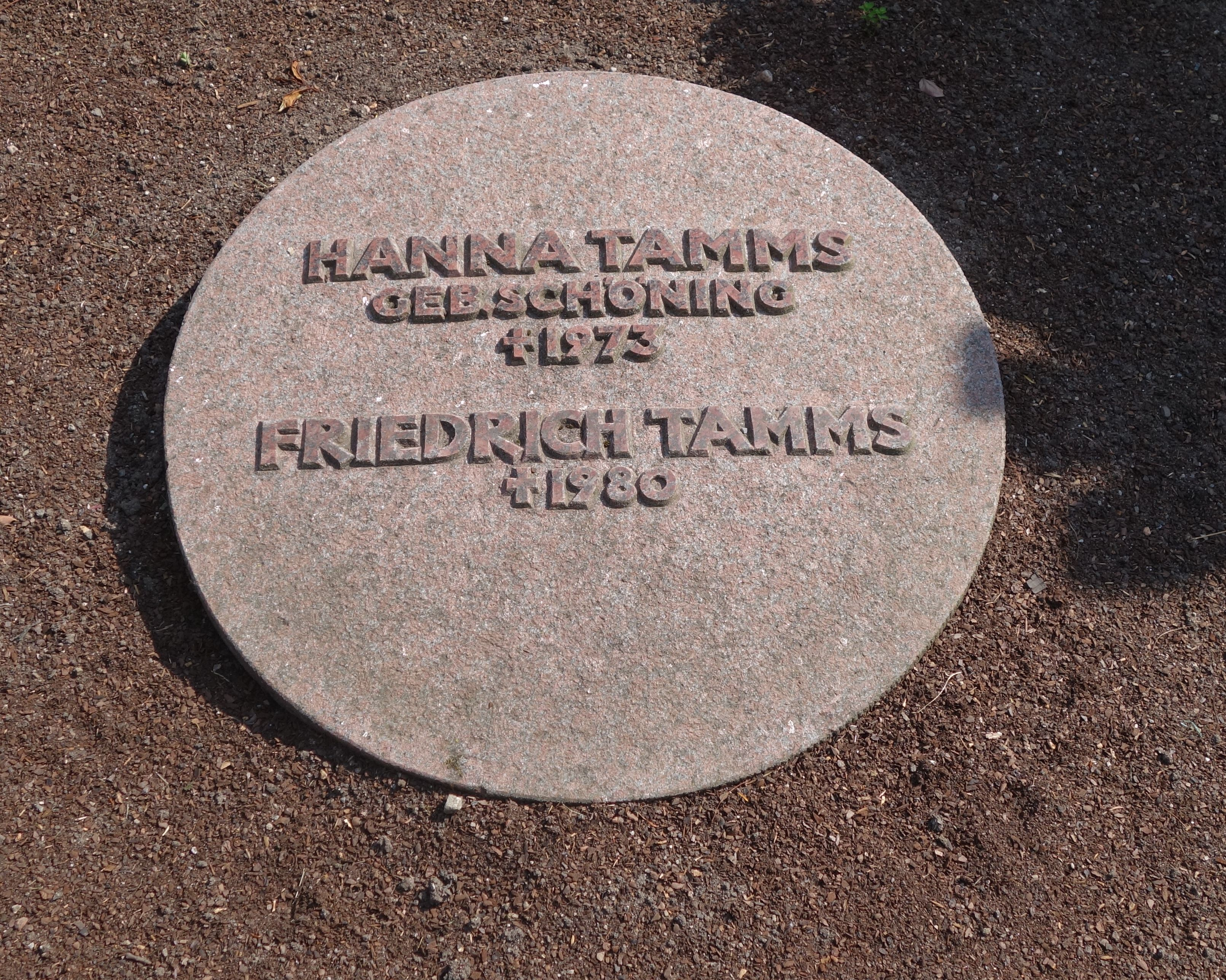 Grabstätte Hanna und Friedrich Tamms, Düsseldorf Nordfriedhof, 2015. Friedrich Tamms (* 4. November 1904 in Schwerin; † 4. Juli 1980 in Düsseldorf) war ein deutscher Architekt. Er war Professor an der Technischen Hochschule Berlin und später Baudezernent in Düsseldorf.